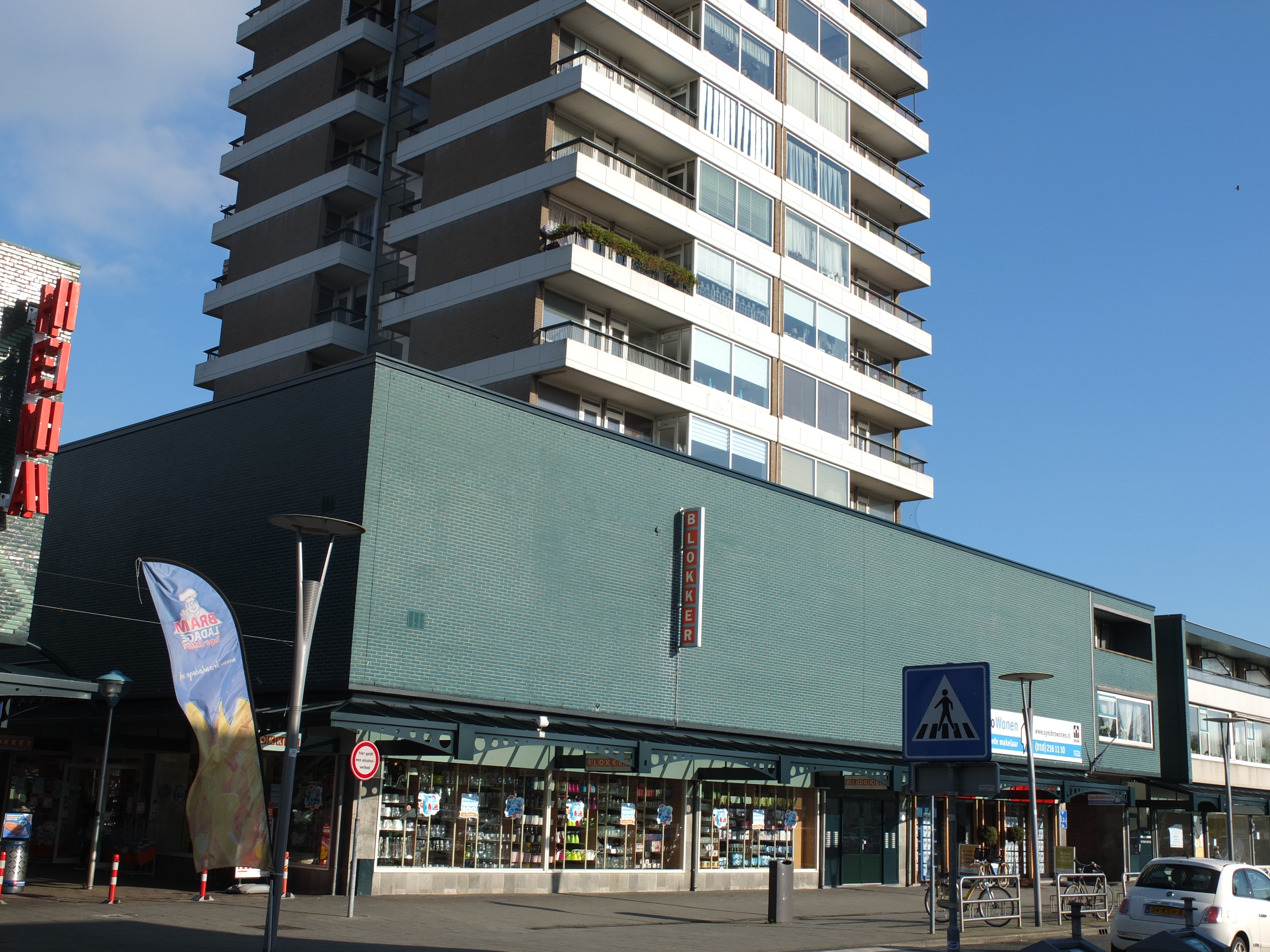 Winkelcentrum de Binnenban in het middengebied van Hoogvliet